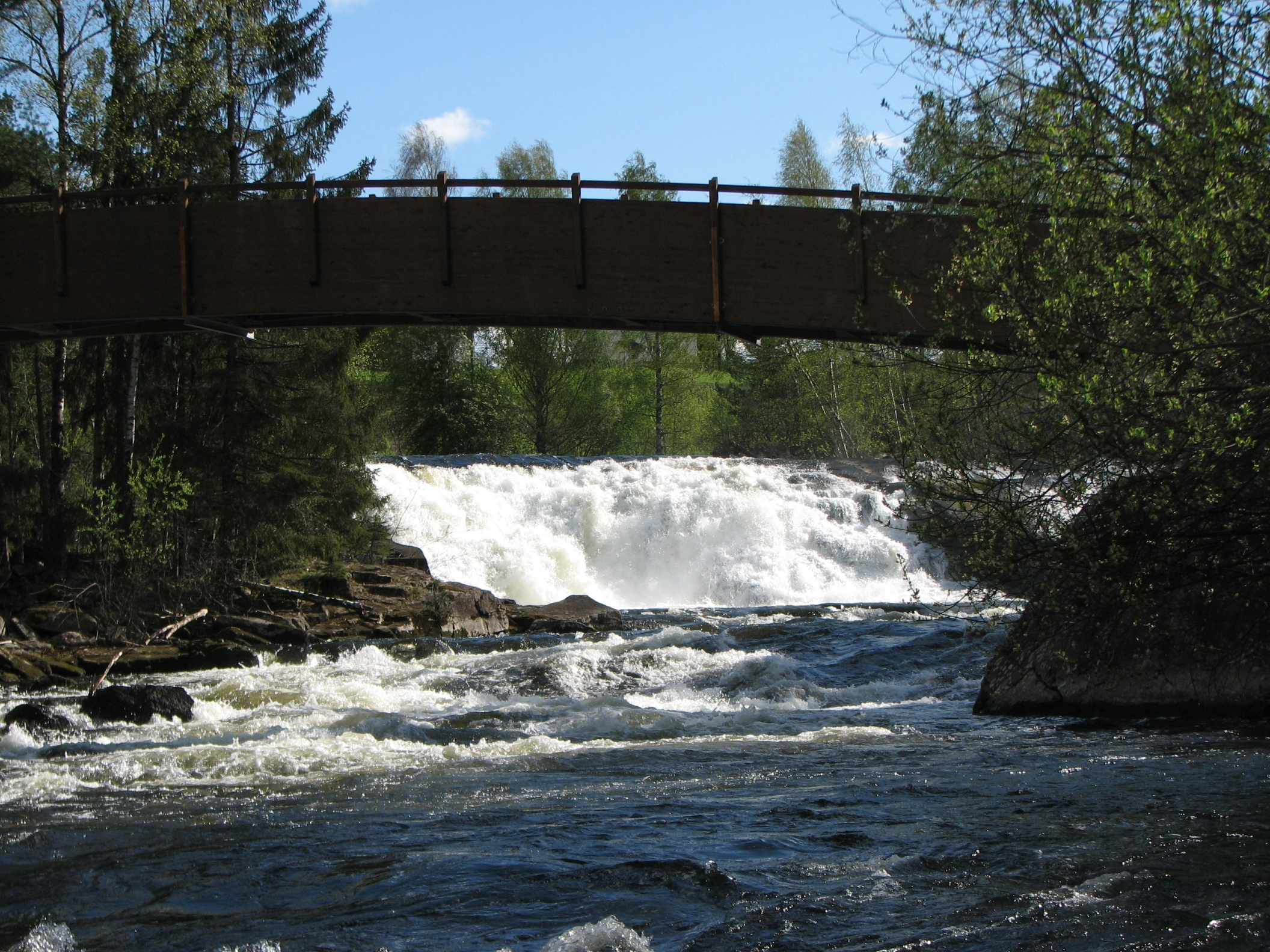 Oterholtfossen og gangbrua over til Kvennøya, Tusenårsstedet i Bø kommune (Telemark)